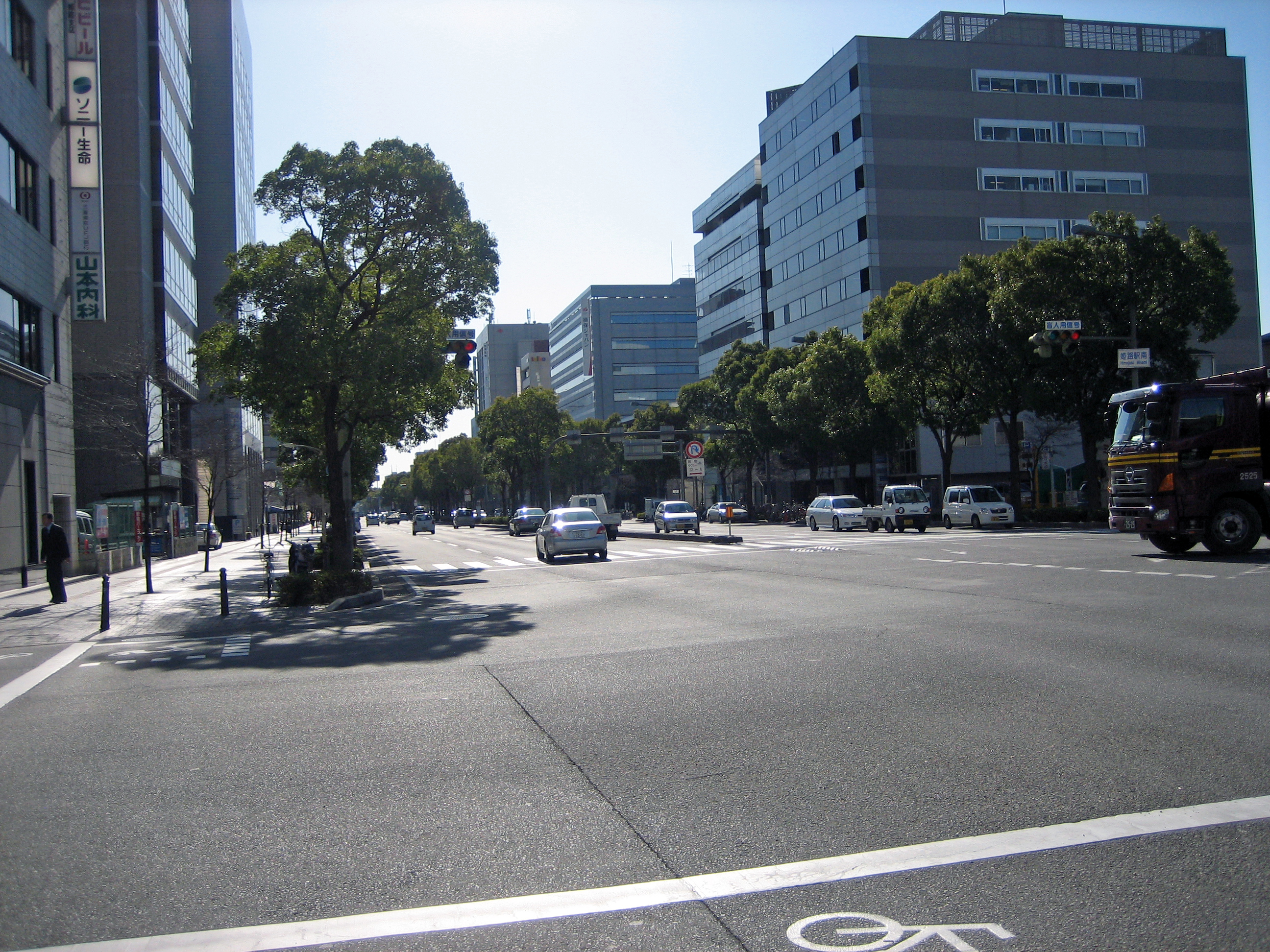 姫路駅南の通り。「駅南大路」。姫路駅南にある交差点付近にて撮影。